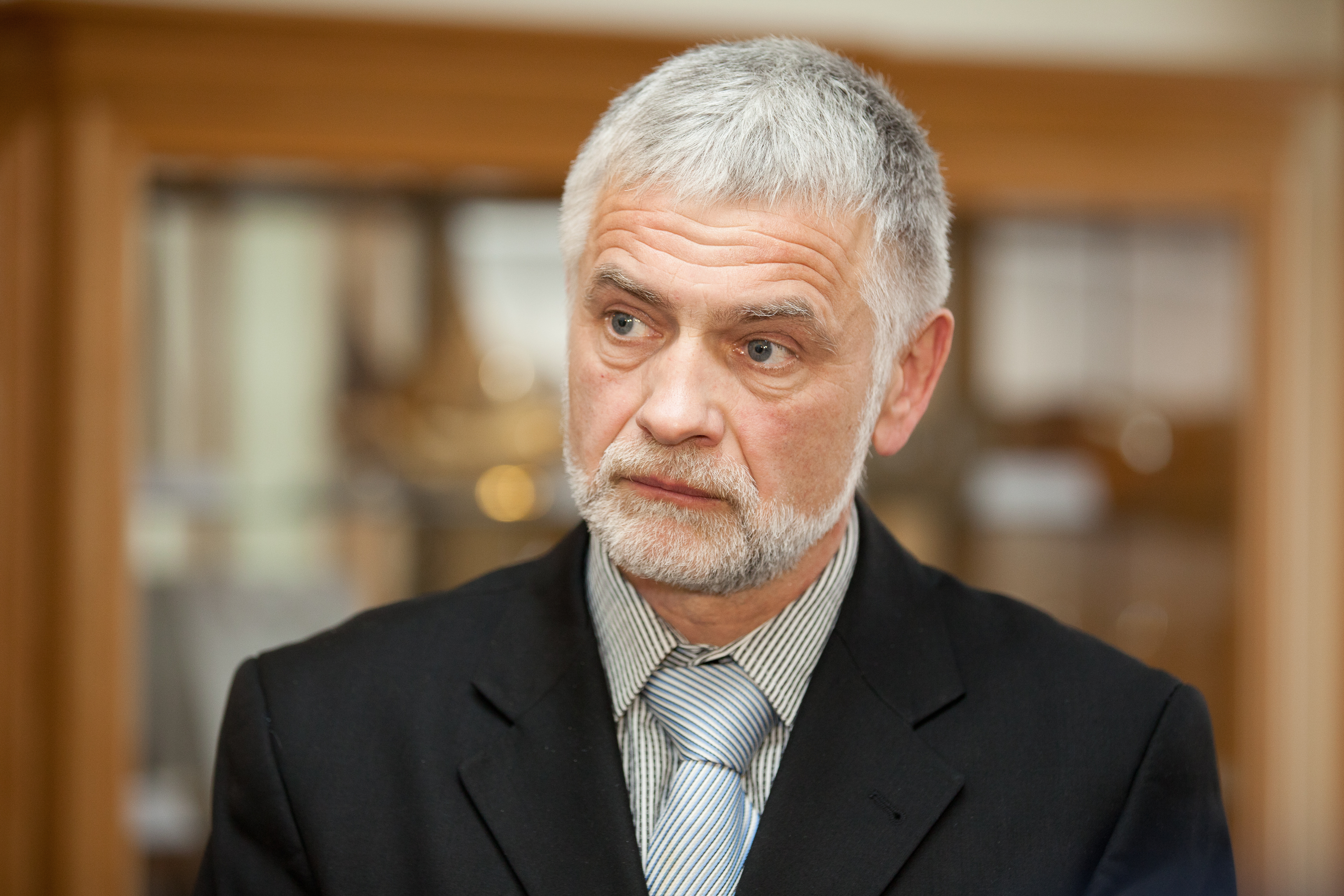 Foto: Toms Norde, Valsts kanceleja